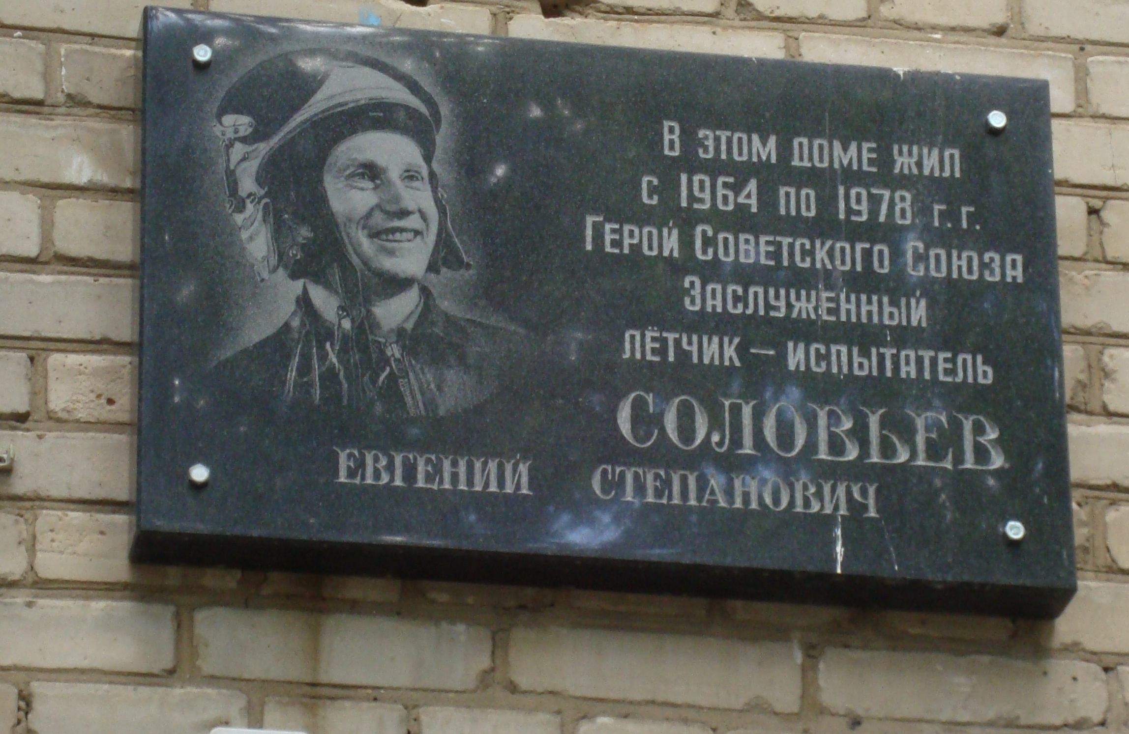 Памятная доска на доме, где жил Евгений Степанович Соловьёв.